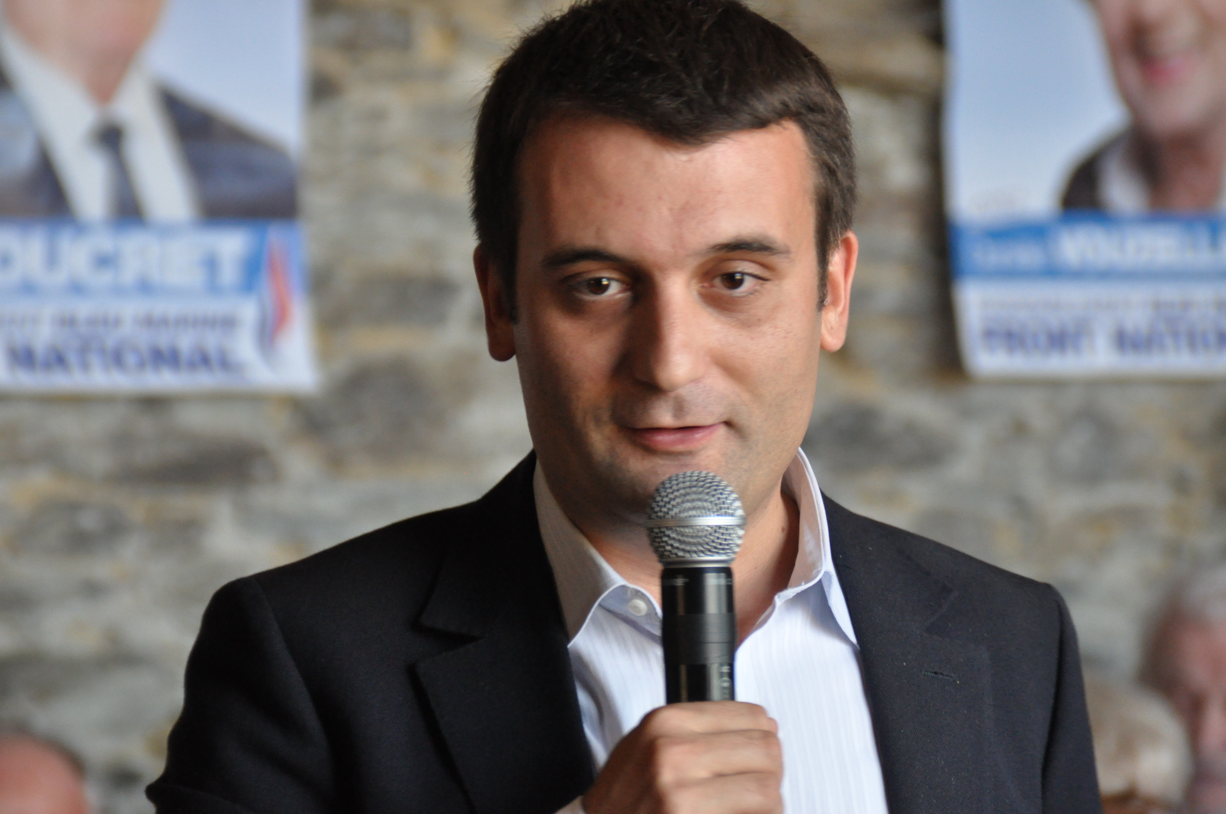 Florian Philippot, vice-président du Front national (FN), lors d'un déjeuner débat organisé le 15 septembre 2012, à la Rabatelière, en Vendée. Photo © 2012 G. Bouchet/Front national